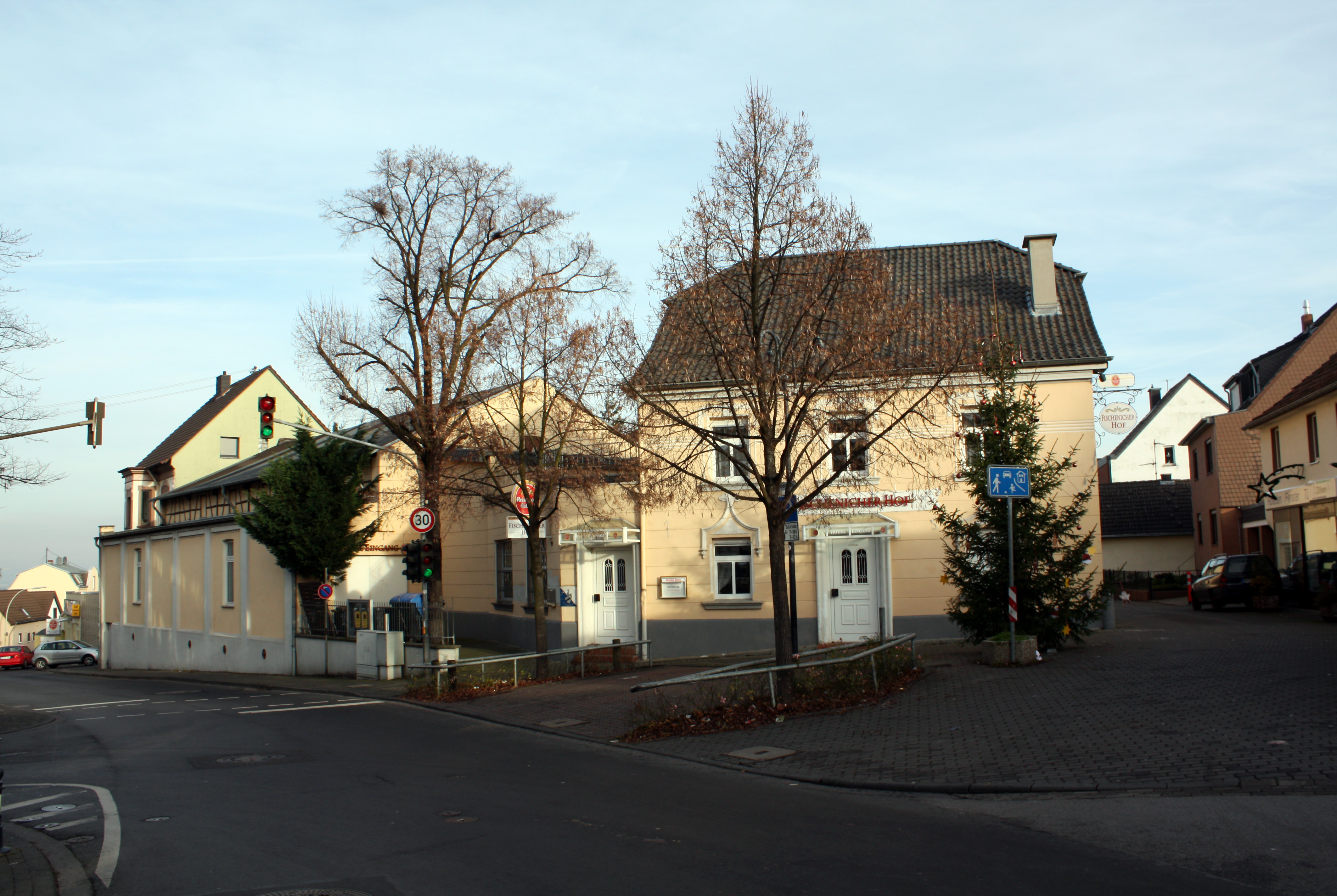 Hürth-Fischenich, Gasthaus von 1856